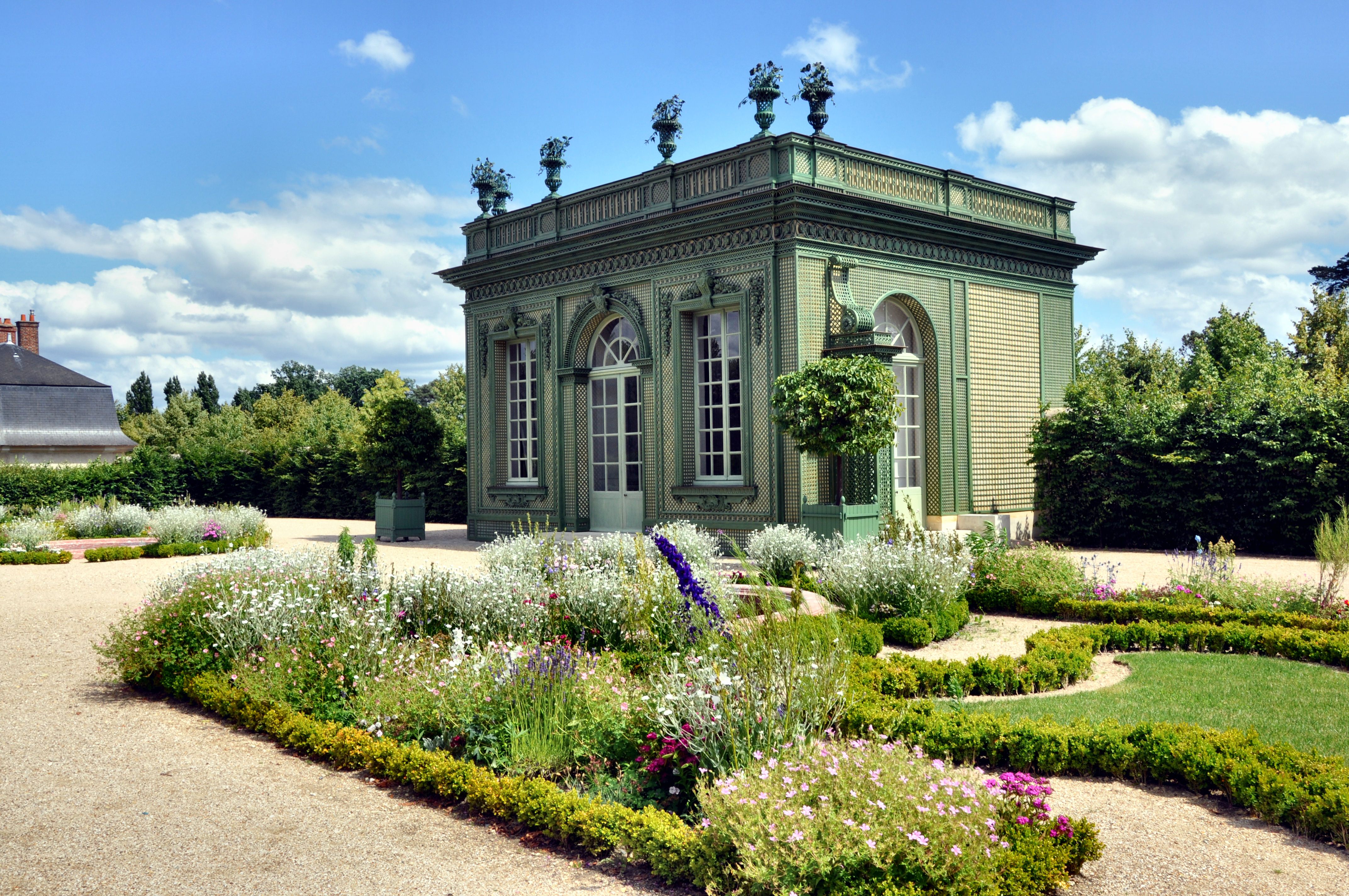 Le pavillon frais, au Petit Trianon de Versailles